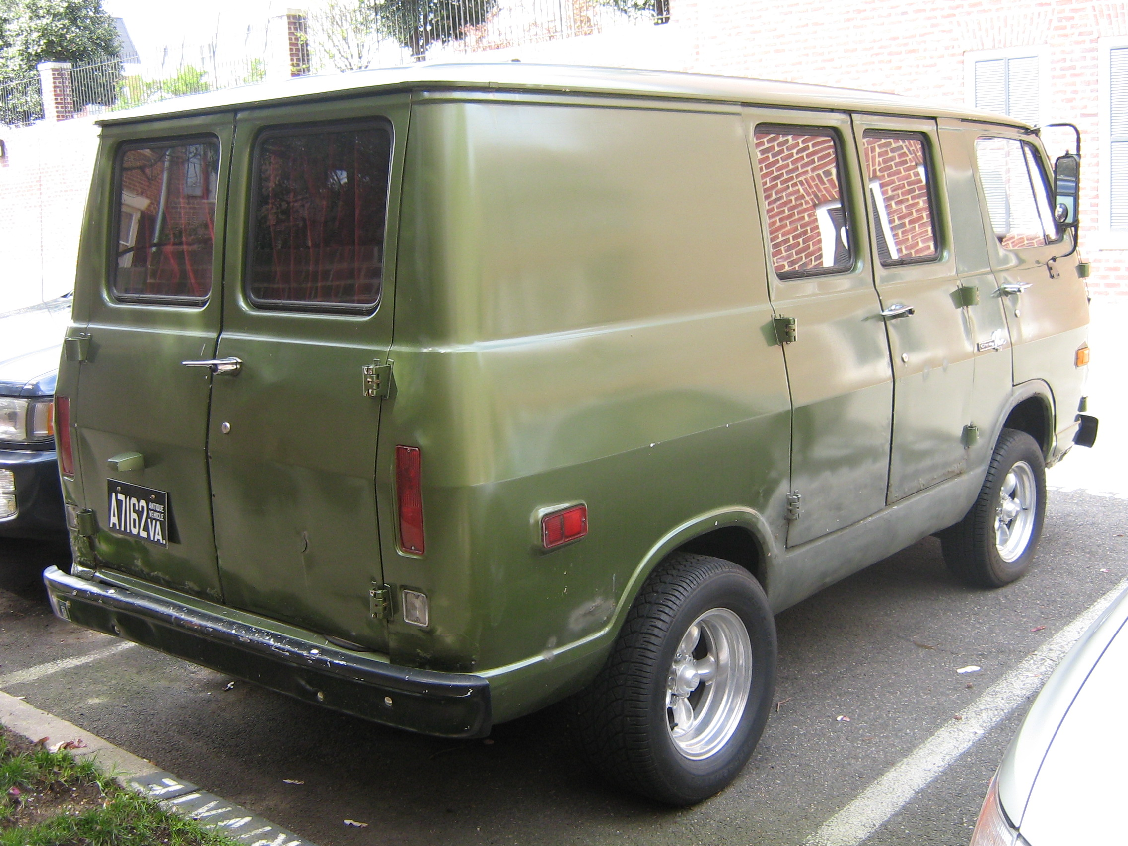 Chevrolet Van